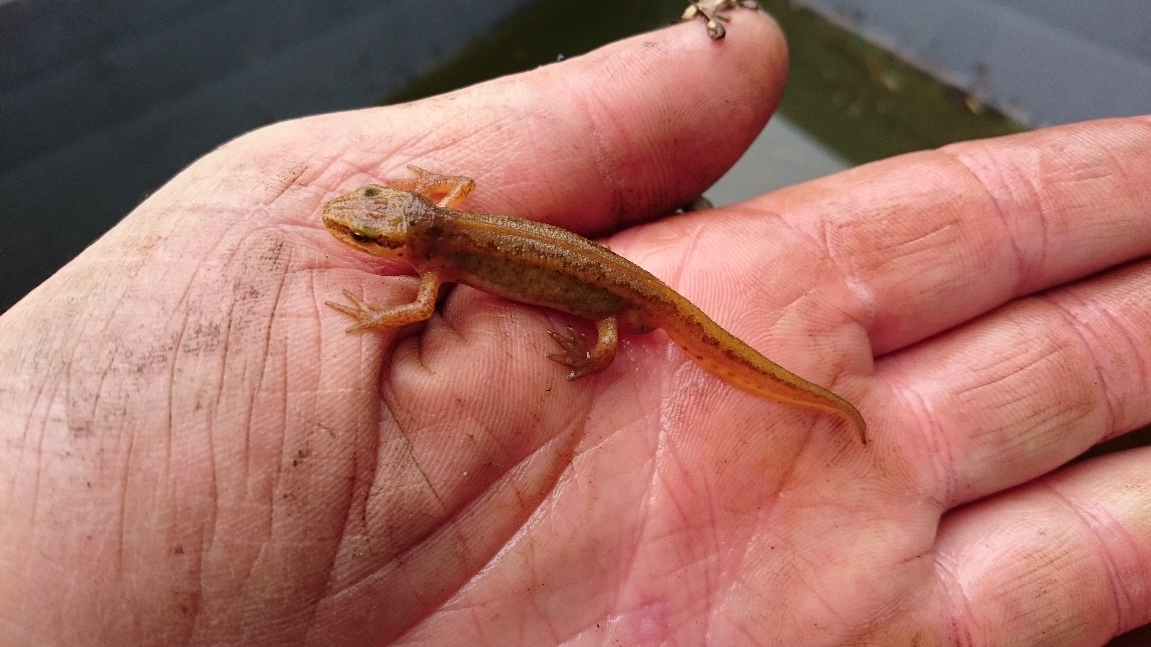 Uhandrea Uliako Lore-Baratzak parkean